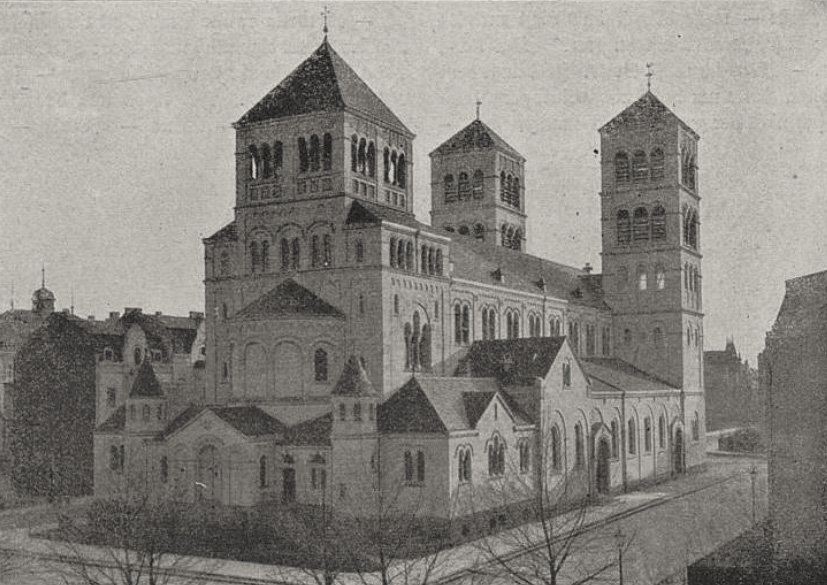 St. Paulus-Kirche in Düsseldorf, erbaut von Prof. Kleesattele. Foto Josef Henne, Düsseldorf, 1913